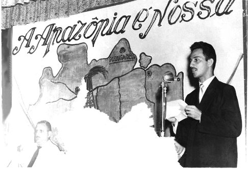 Jinkings na tribuna discursando